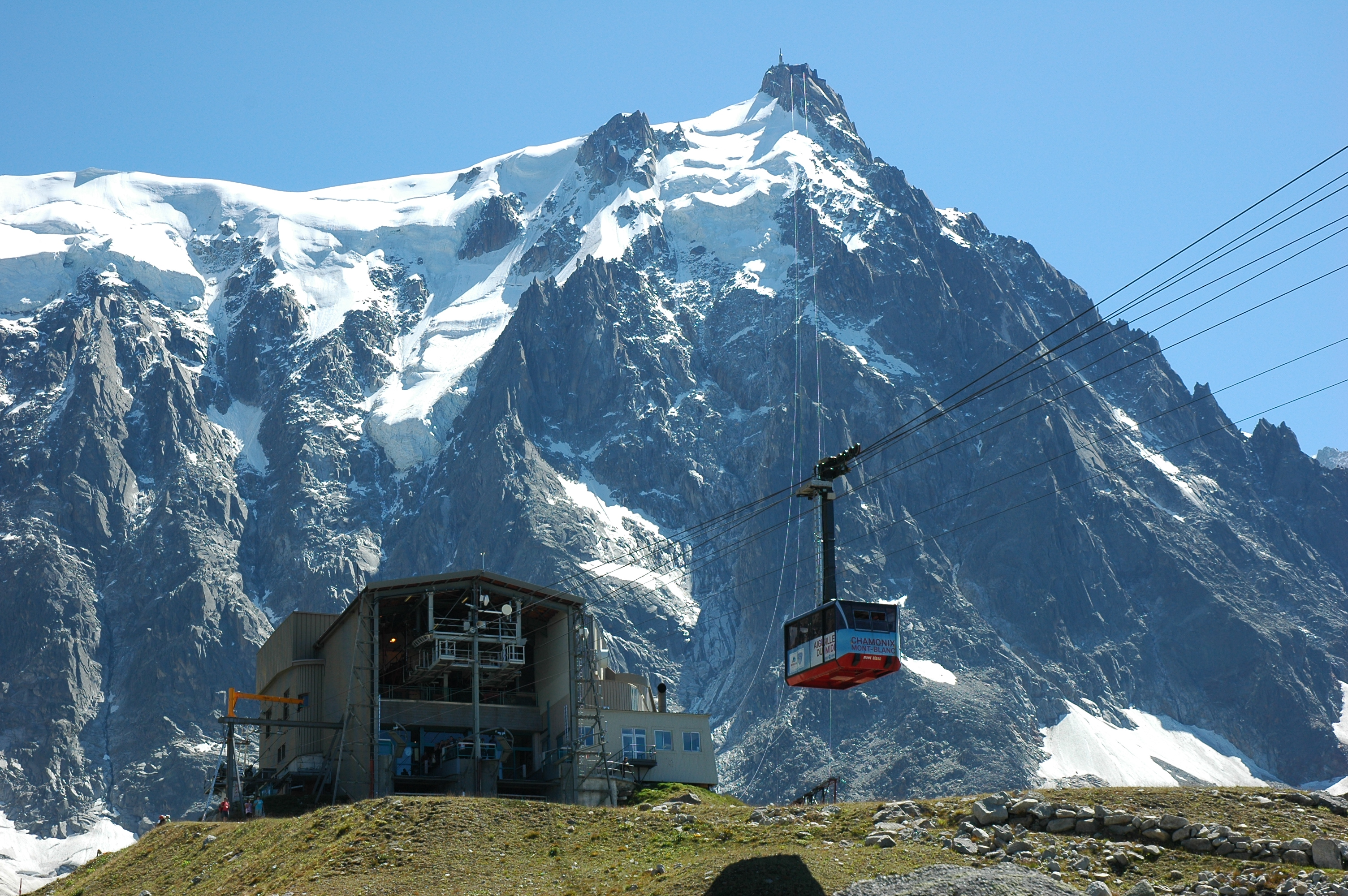 France Chamonix-Mont-Blanc Aiguille du Midi